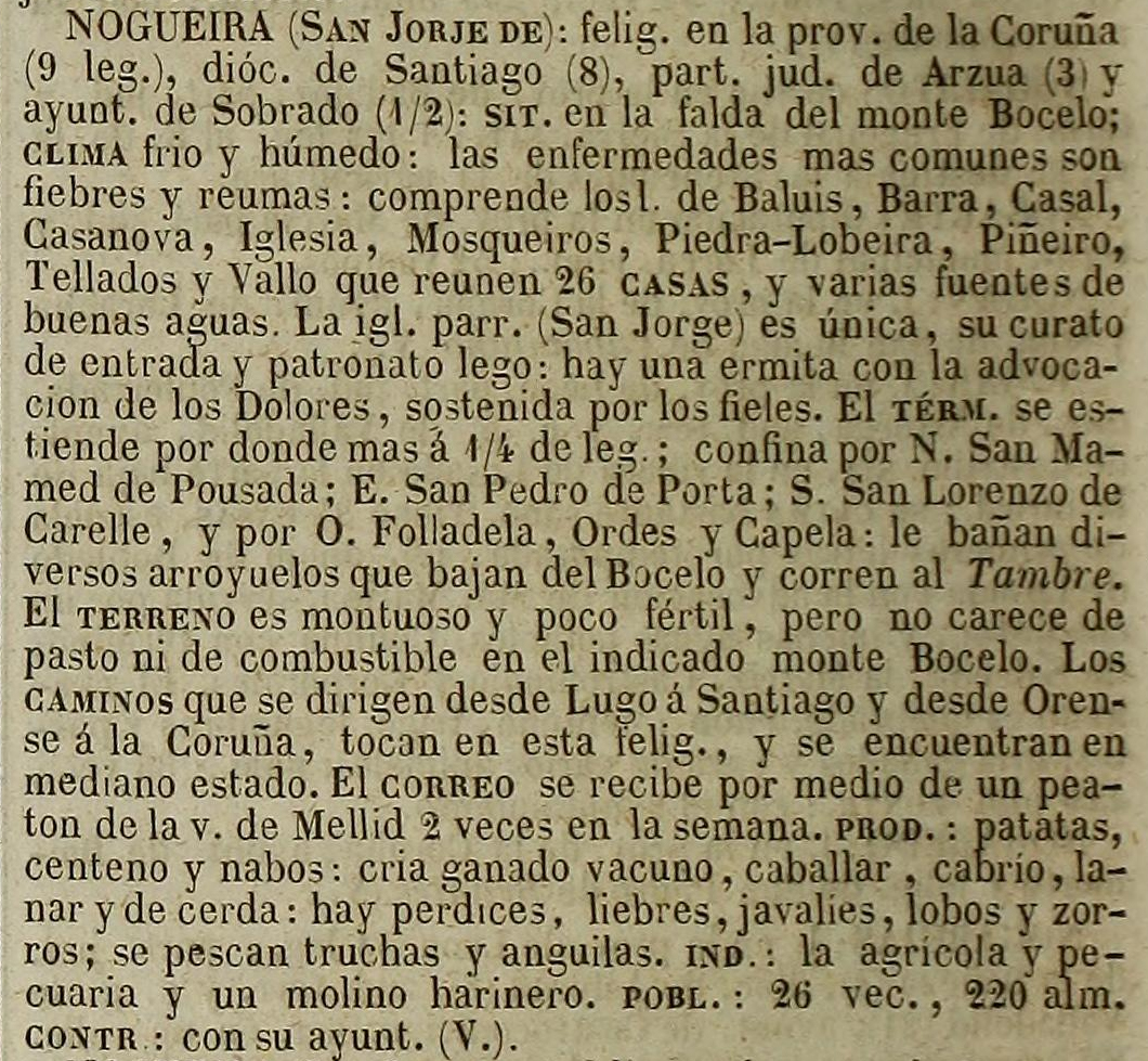 Nogueira no Diccionario geográfico-estadístico-histórico de España y sus posesiones de Ultramar.